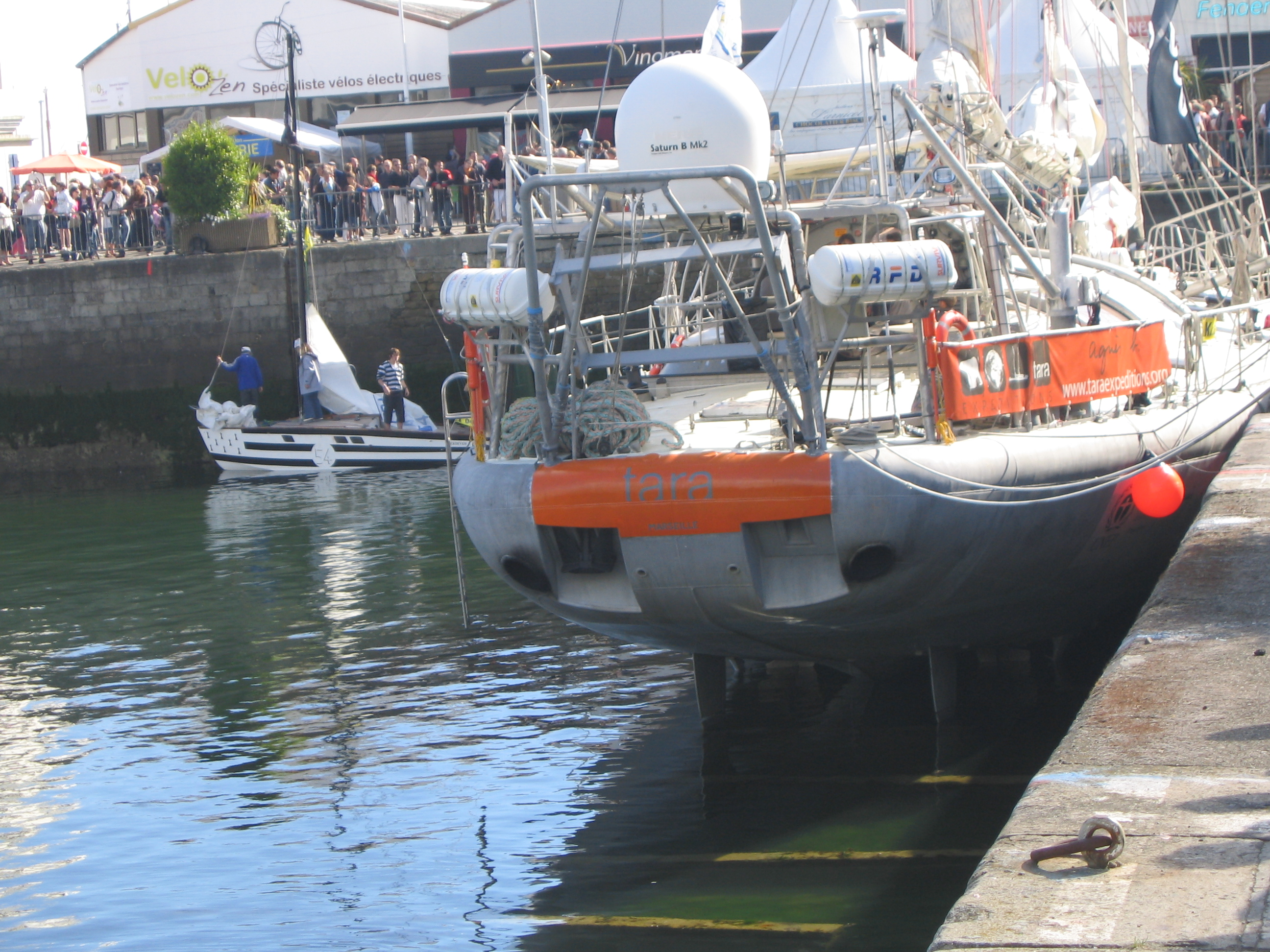 Lors de Brest 2008